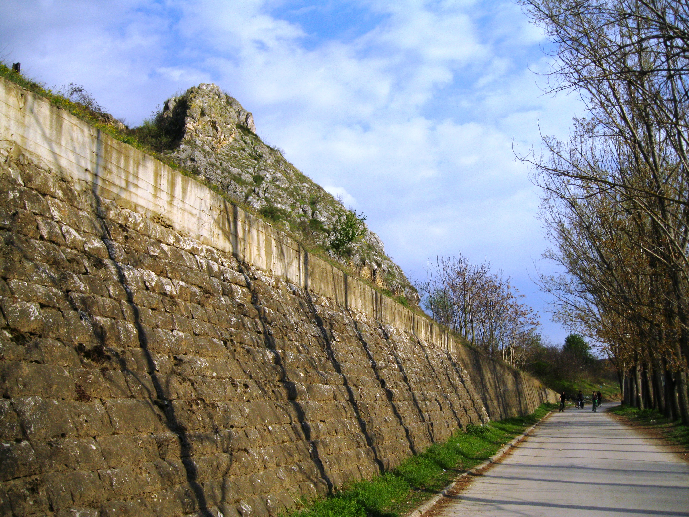 Stara Banja vo Kumanovo